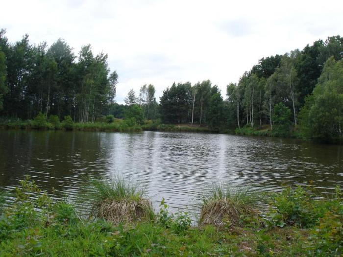 Bělečský písník u Hradce Králové